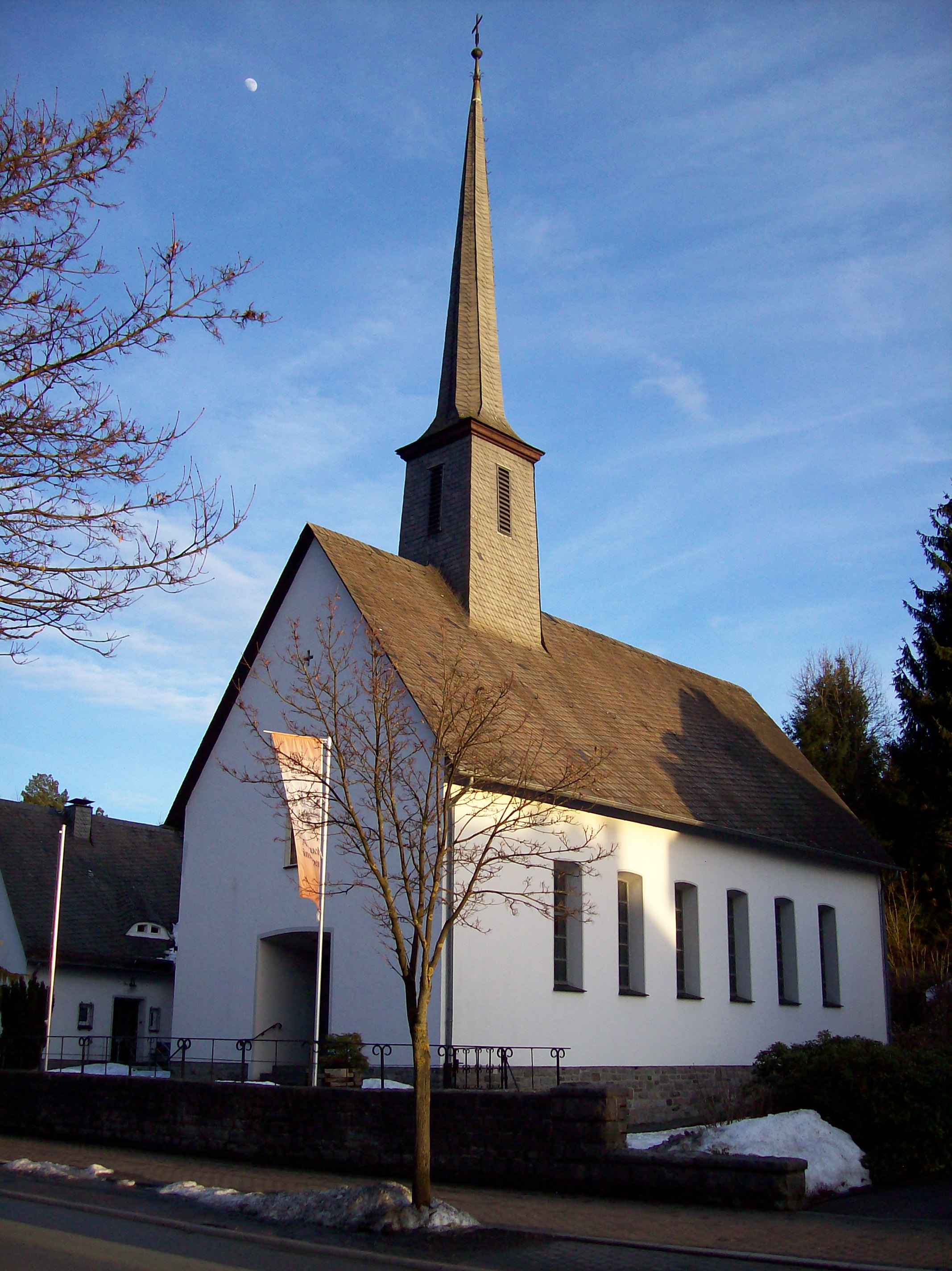 Bestwig, ev. Kirche (Germany)